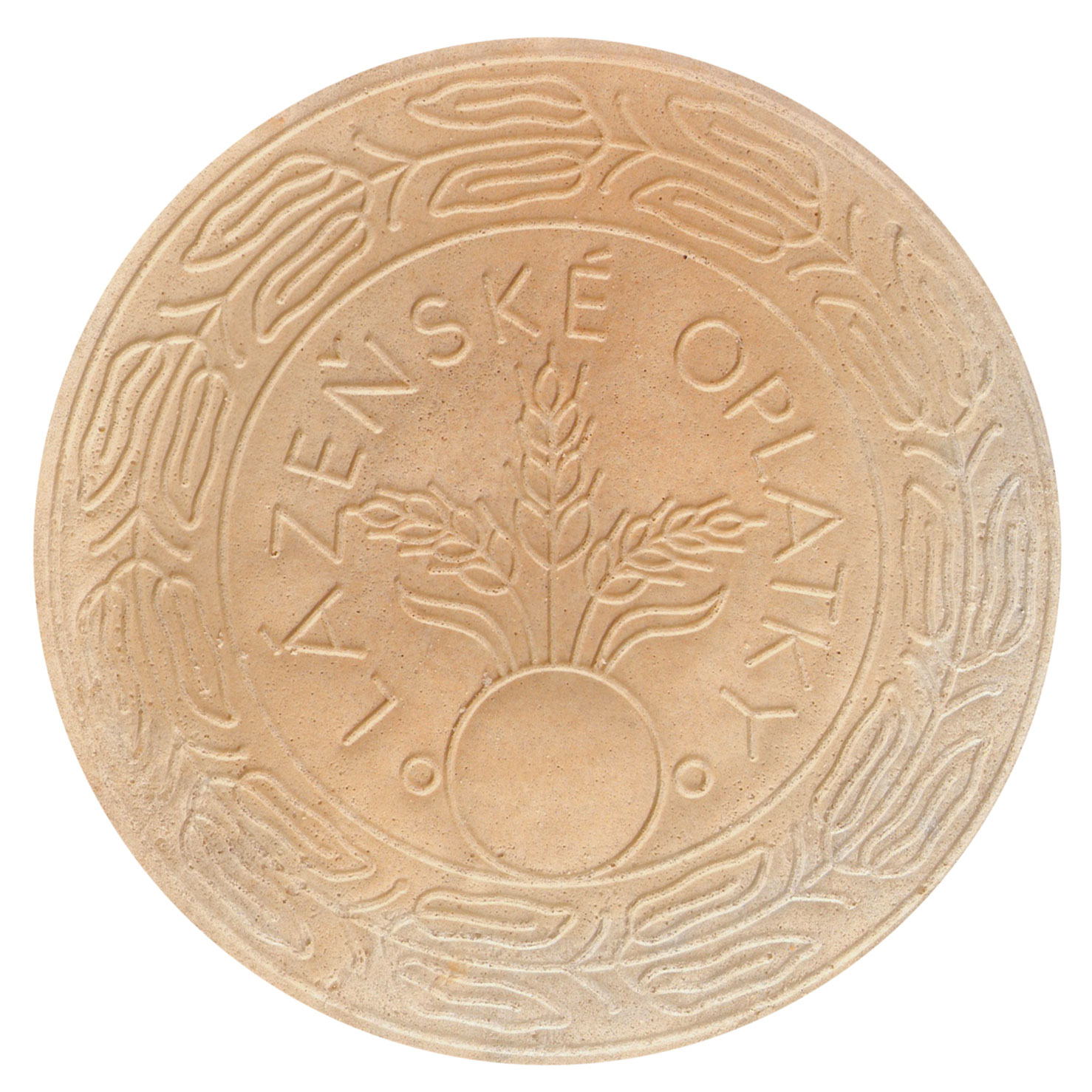 Karlsbader Oblate. Es handelt sich um eine Tschechische Oblate (Marienbader Oblate) die den in Deutschland produzierten Karlsbader Oblaten als Vorbild dienten. Das Relief liest sich "Lázeňské oplatky", eine Kurzform von "Mariánskolázeňské oplatky", Marienbader Oblate. Der Karlsbad "Karlovy Vary" hat als tschechisches Demonym "karlovarský".